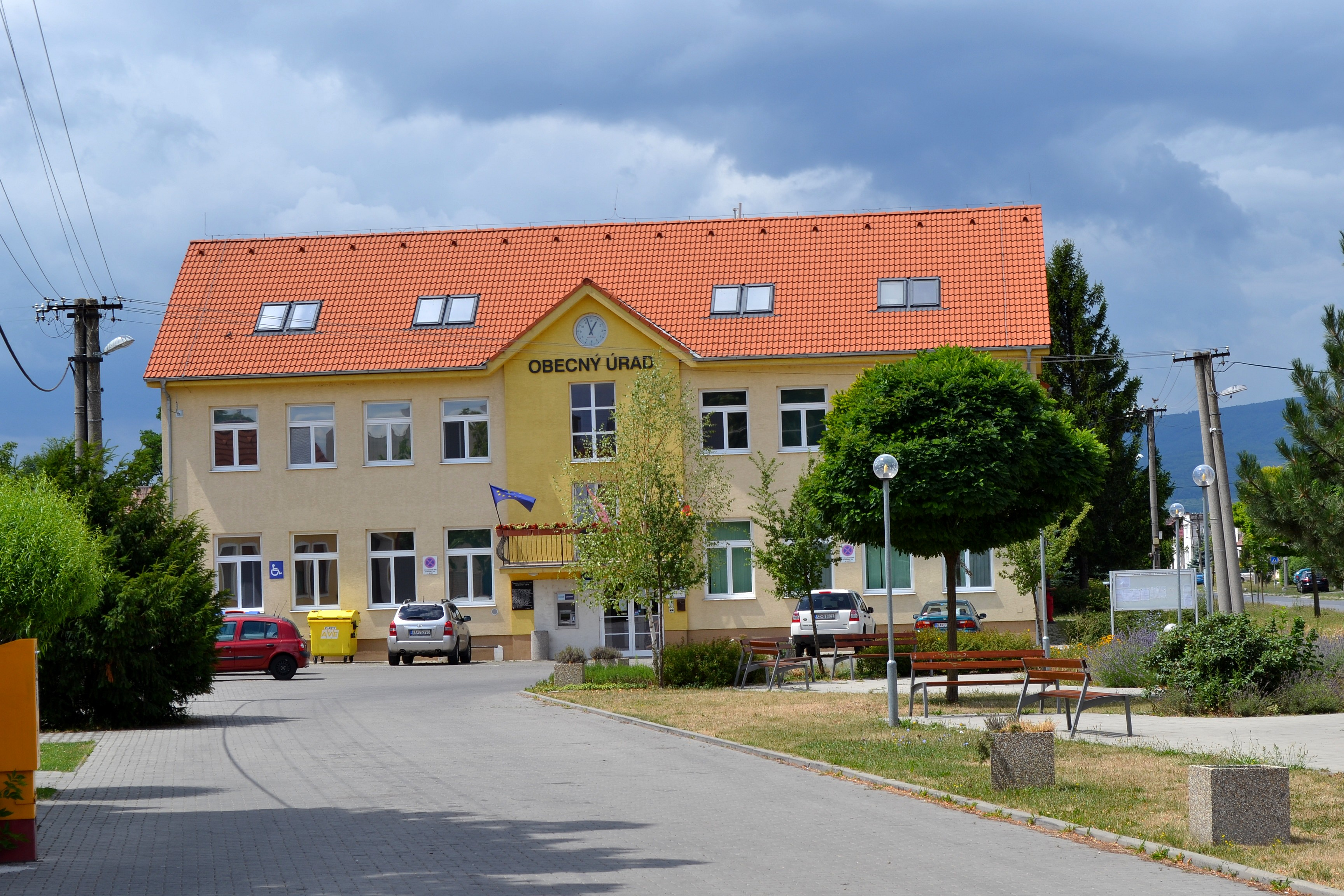 Chorvátsky Grob, budova obecného úradu